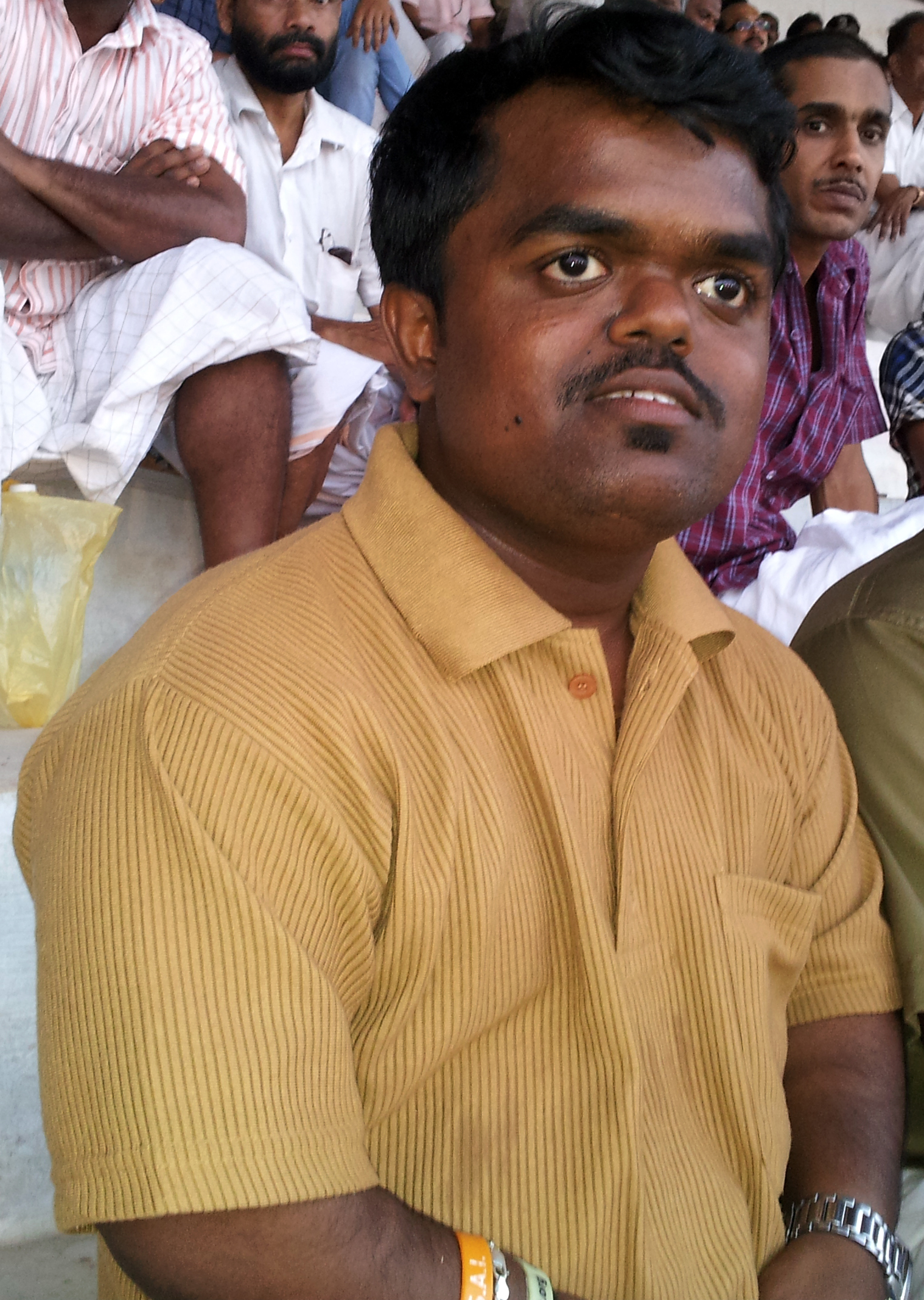 ആകാശ് മാധവന്‍ ഒരു കായിക താരമാണ്‌